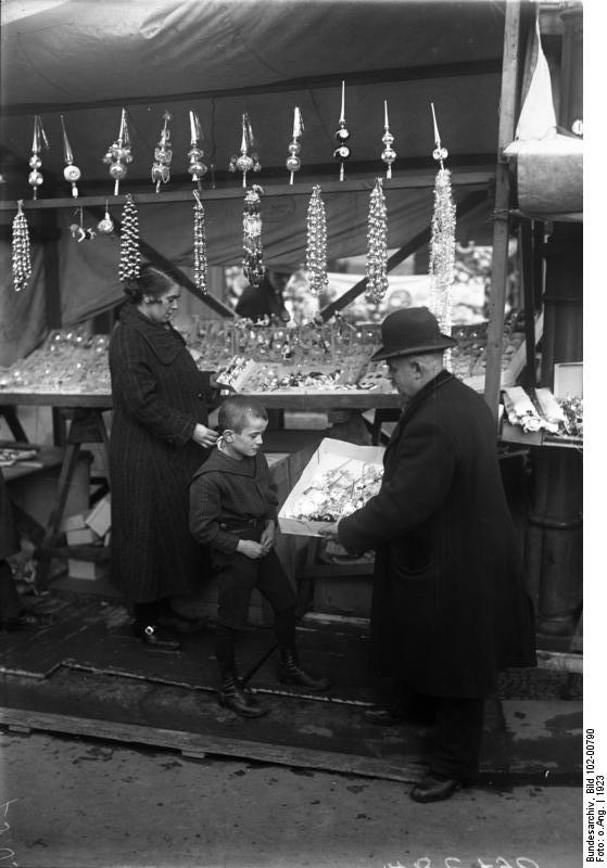 Weihnachtsmarkt in Berlin am Alexanderplatz. Ein Händler mit Christbaumschmuck. 1923